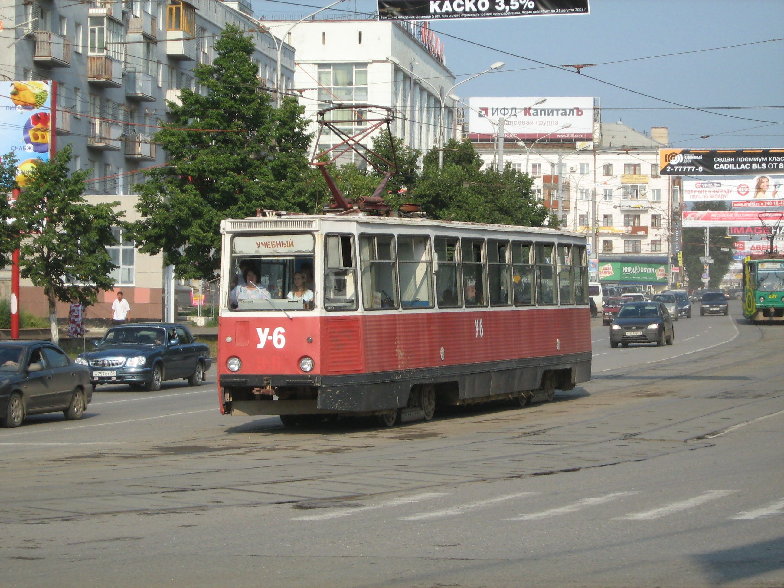 Учебный трамвай в Перми на улице Ленина.